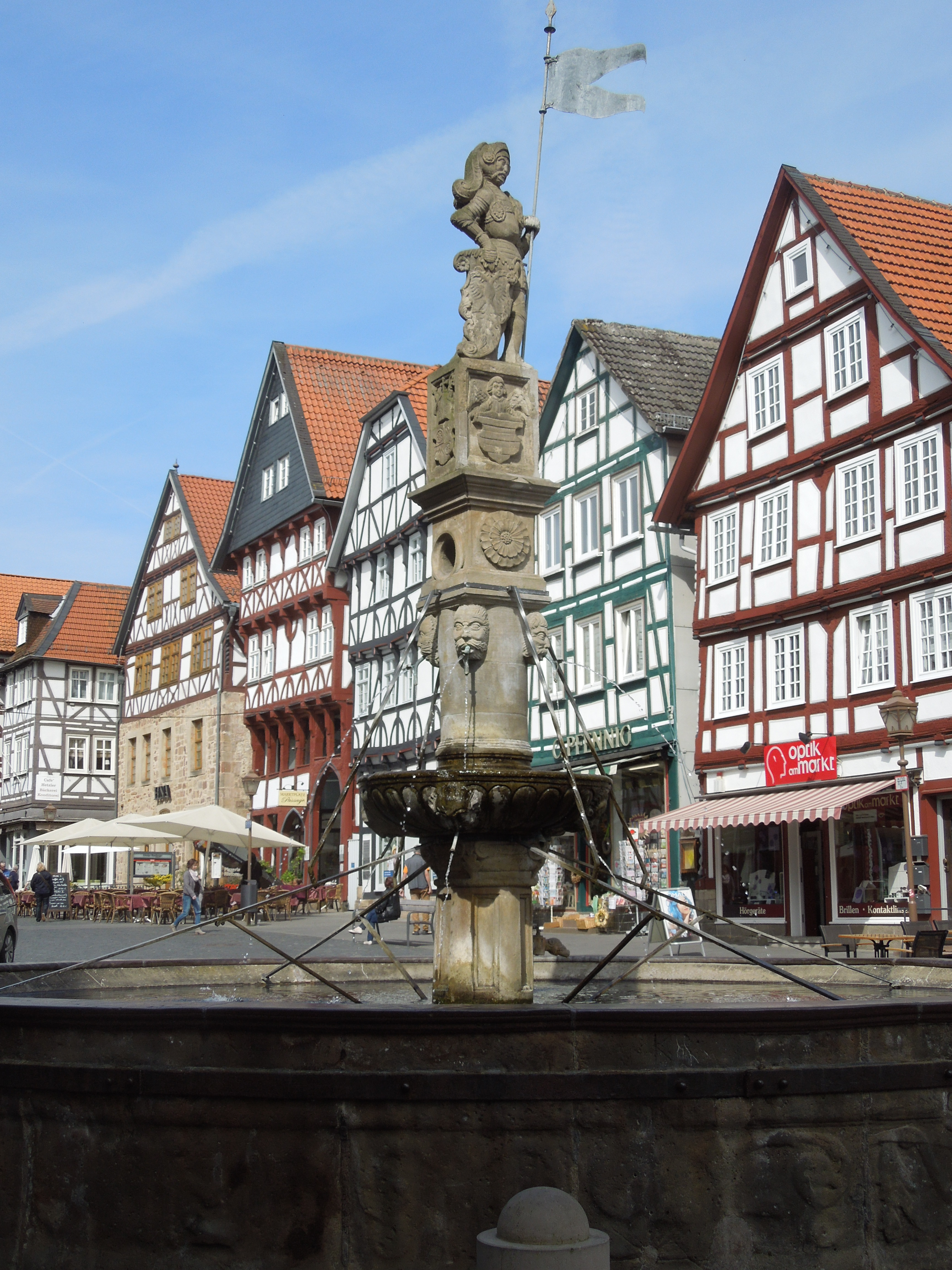 Der Rolandsbrunnen auf dem Marktplatz von Fritzlar